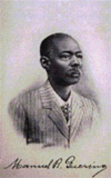 Manuel Raimundo Querino (Santo Amaro da Purificação, 28 de julho de 1851, Salvador, 14 de fevereiro de 1923) foi um intelectual afro-descendente, aluno fundador do Liceu de Artes e Ofícios da Bahia e da Escola de Belas Artes, foi escritor e pioneiro nos registros antropológicos da cultura africana na Bahia.